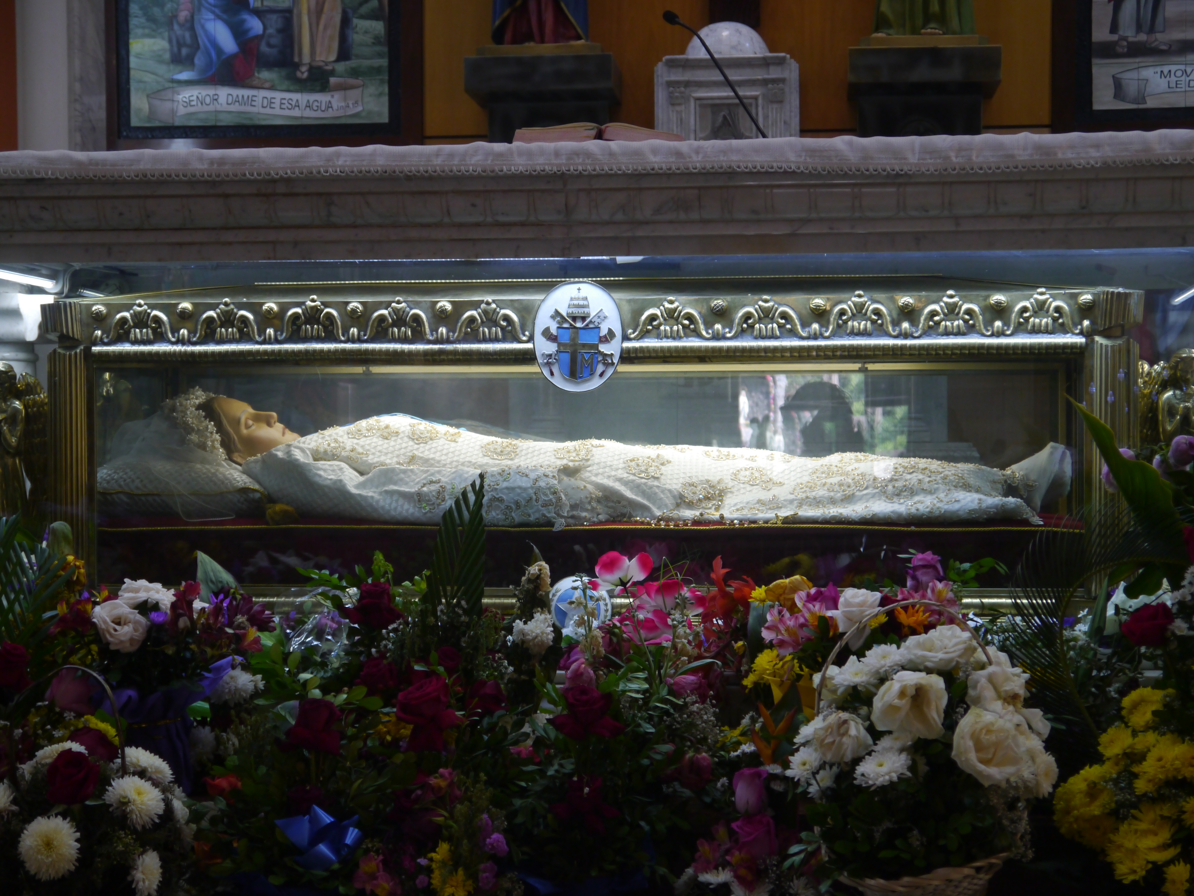 En el Santuario Narcisa de Jesús de Nobol